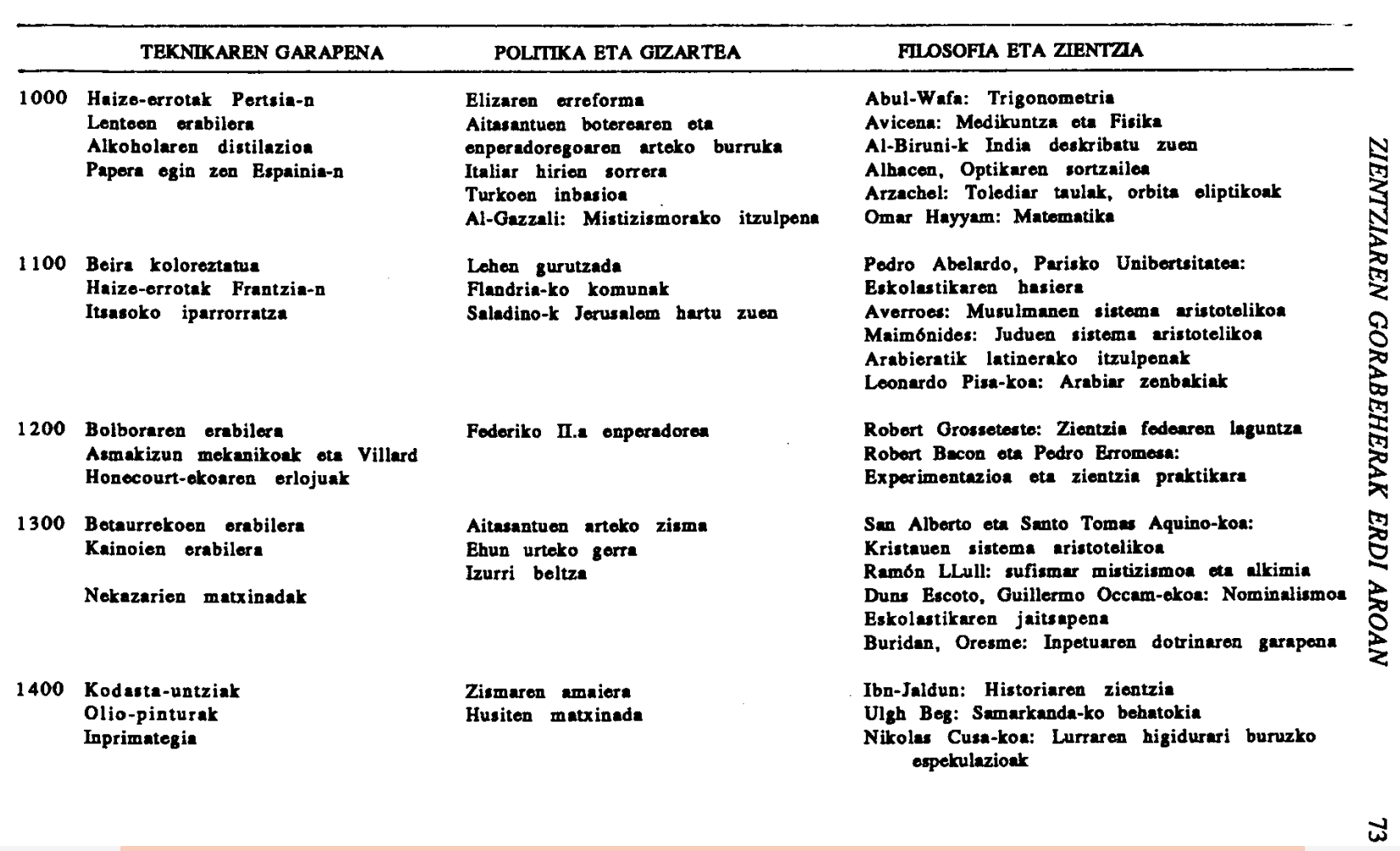 Taula, Fisikaren Historia (1000-1400). Jatorria: Fisikaren historia laburra, UEU, 1990